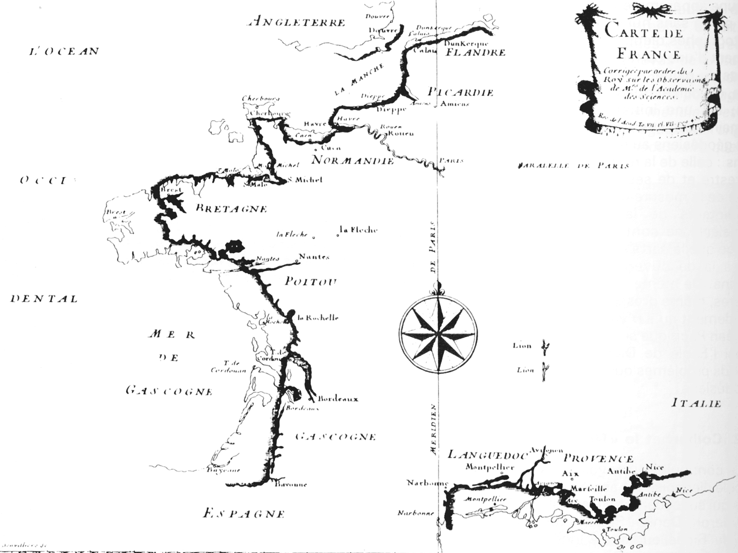 Carte des côtes de France corrigée par l'Académie